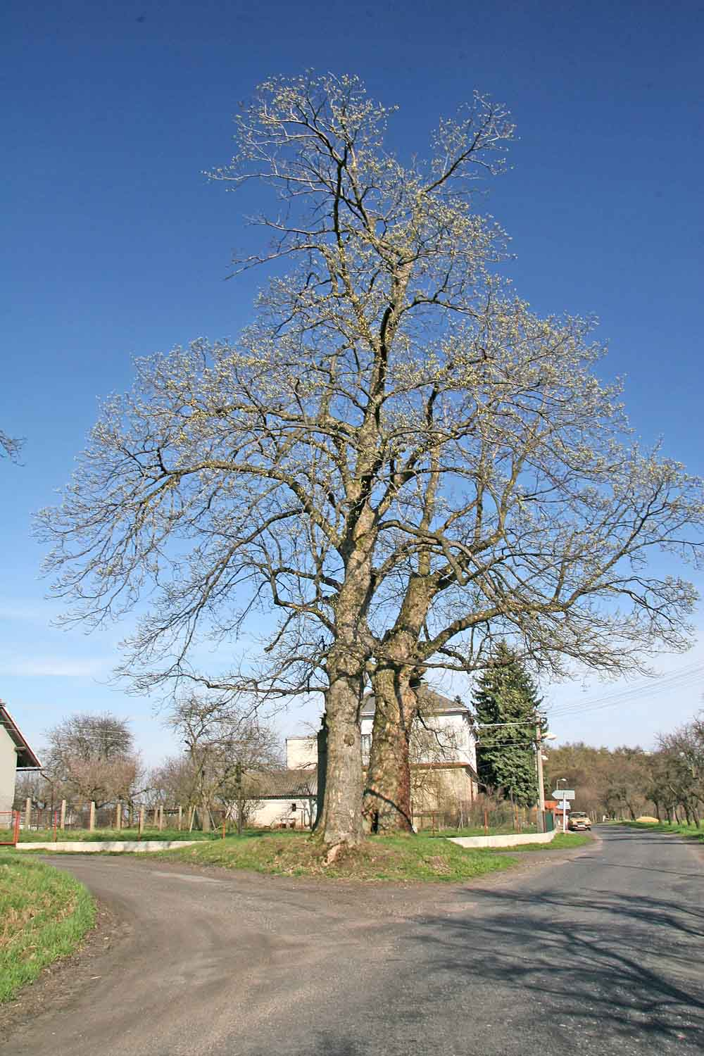 Památné javory kleny v obci Boháňka